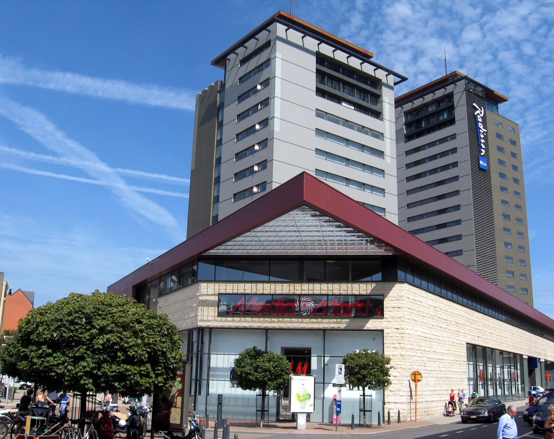 Twee Toren Wijk, hoogbouw, in Hasselt